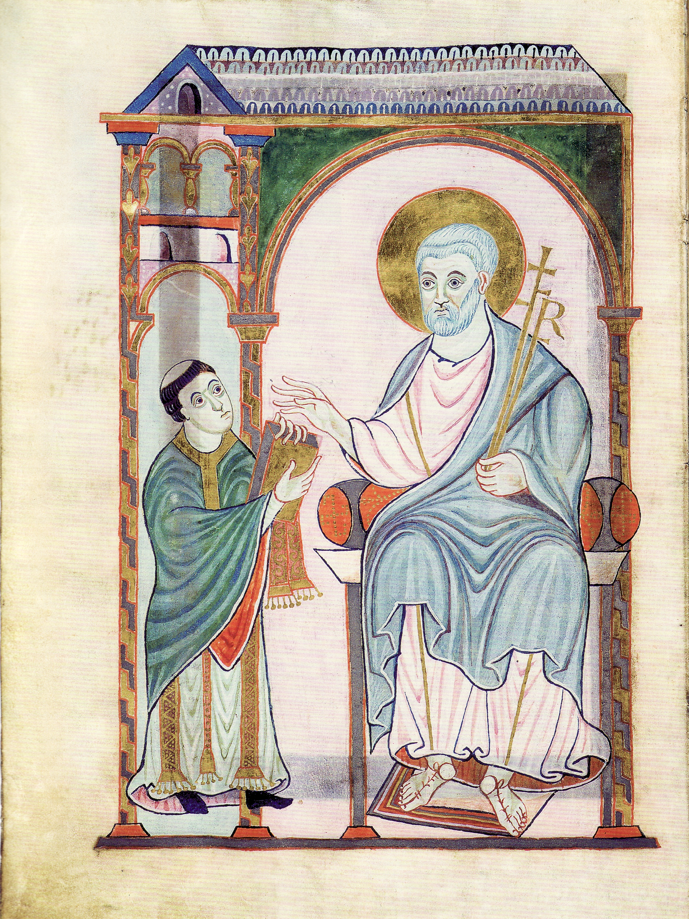 Stifterbild des Gero-Kodex: Bischof Gero von Köln überreicht dem thronenden Petrus den Kodex